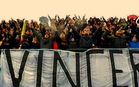 Tifosi magliesi in trasferta nel derby con il Galatina